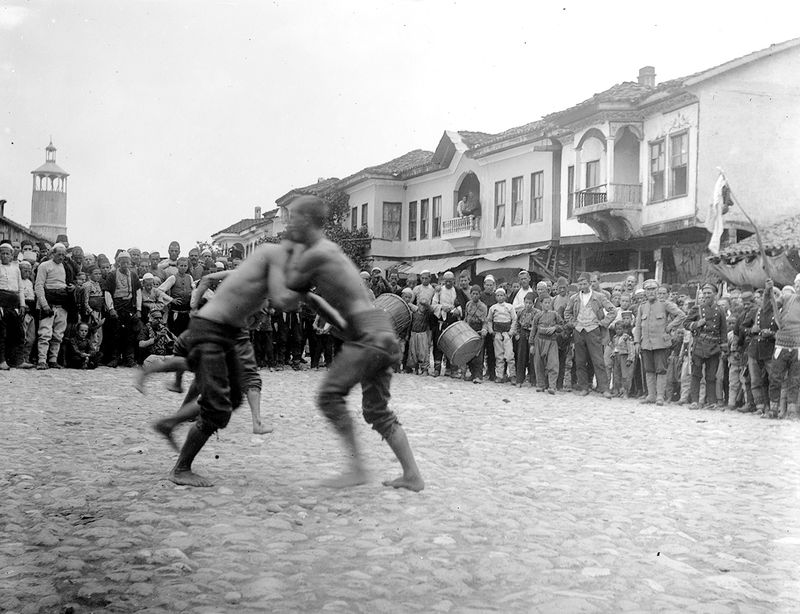 Празнуване на Илинден - денят на Илинденското въстание на 20 юли 1916 година в окупирания от български части Гостивар.